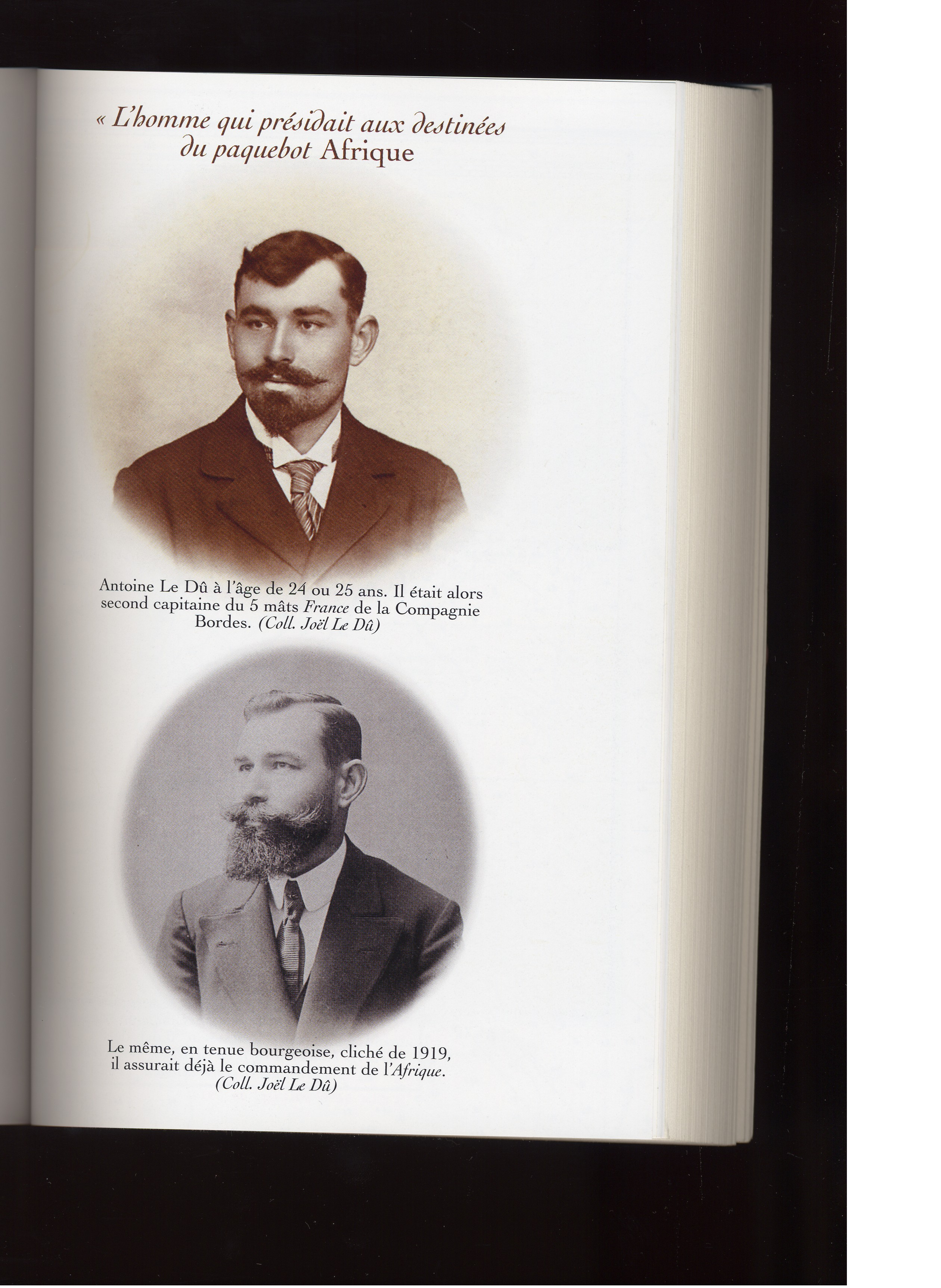 Antoine le Dû en haut a l'âge de 24 ou 25 ans et en bas proche des 40 ans